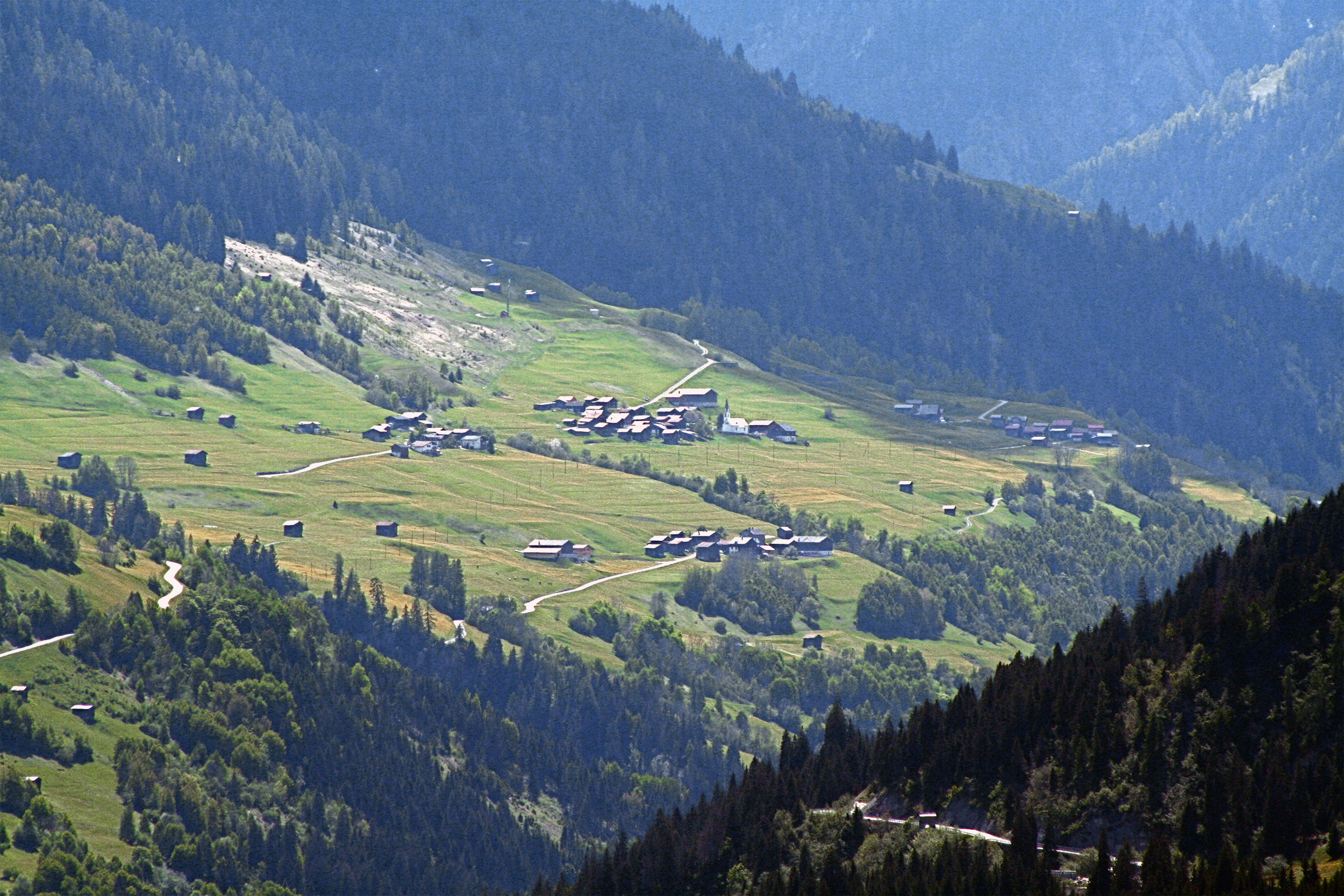 Camuns von Falera aus gesehen